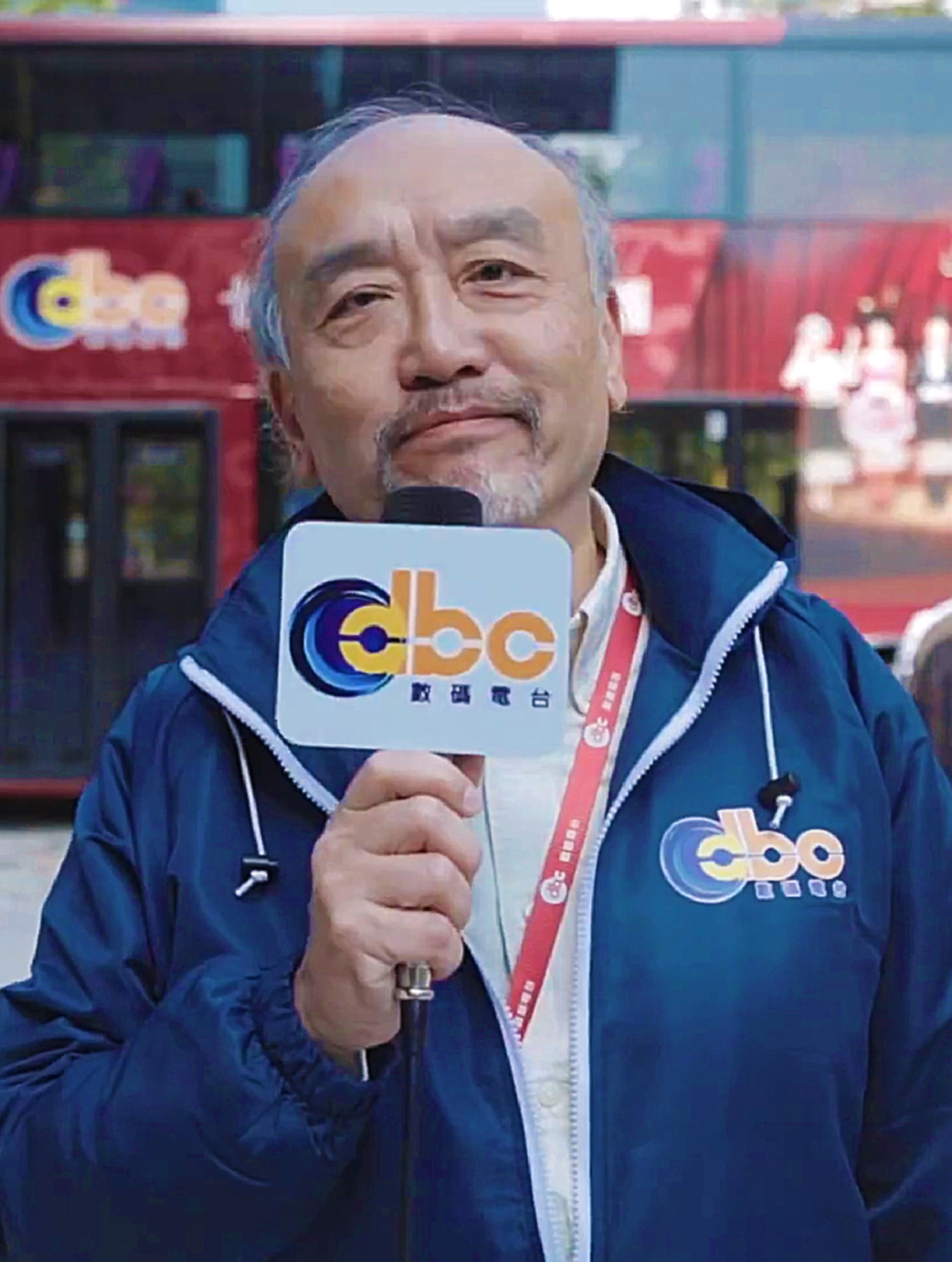 中文（香港）: 1995年移居澳洲生活，回流後曾經任職無綫收費電視行政總裁、香港商業電台節目主持兼首席助理行政總裁、路訊通控股有限公司集團董事總經理助理及署理總經理。